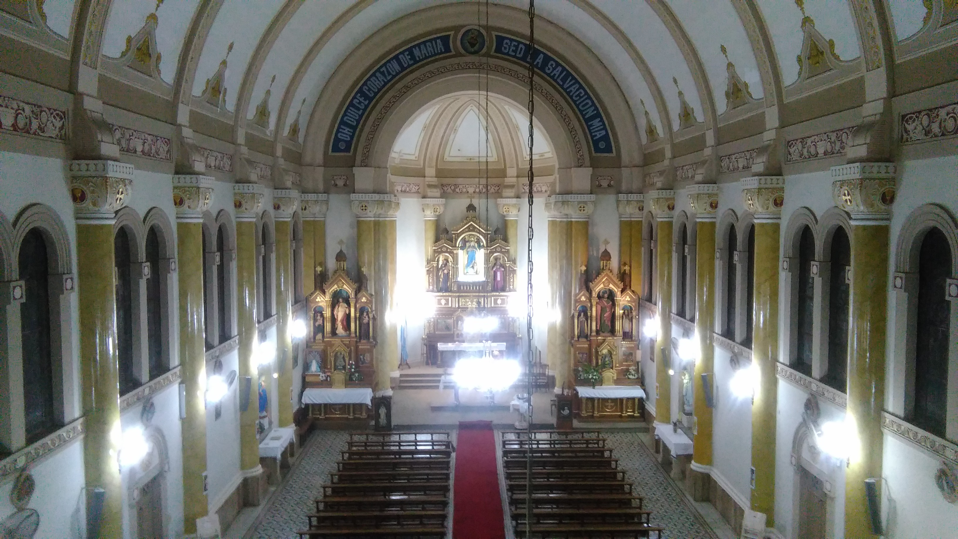 Interior de la Parroquia Inmaculado Corazon de Maria Bahia Blanca desde el coro